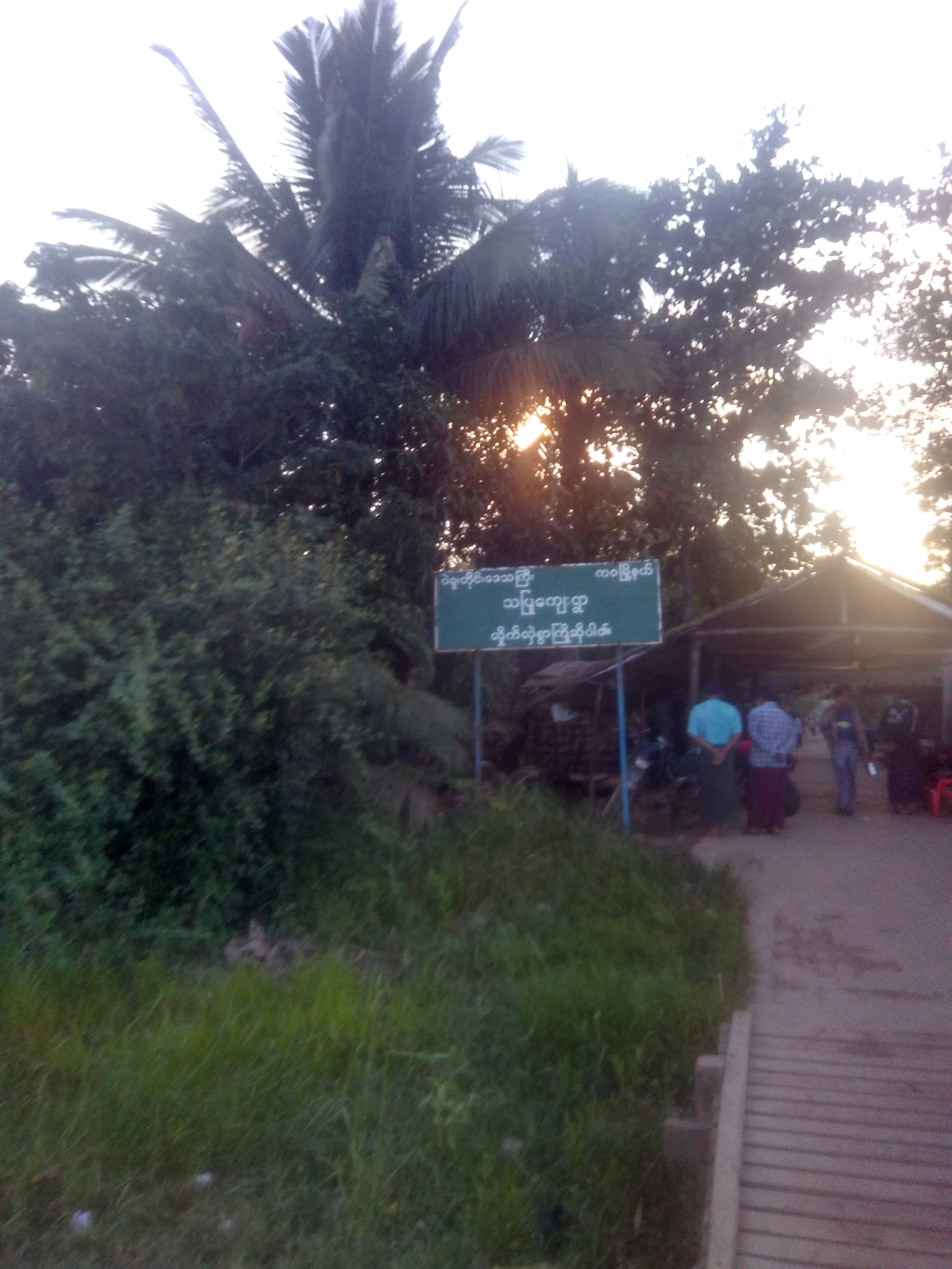 သပြုကျေးရွာ၊ ကဝမြို့နယ်၊ ပဲခူးတိုင်းဒေသကြီး